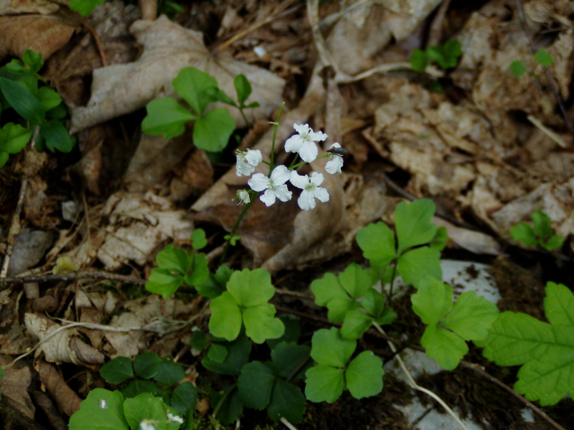 Cardamine trifolia, Tscheppaschlucht, Karawanken, Carinthia